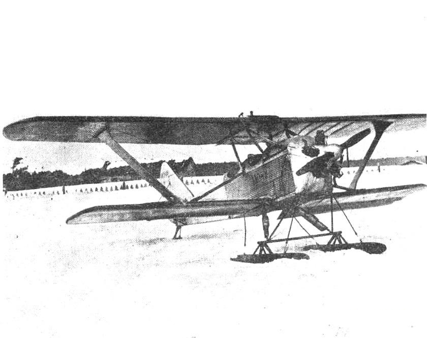 Vinogradov Idrago 3